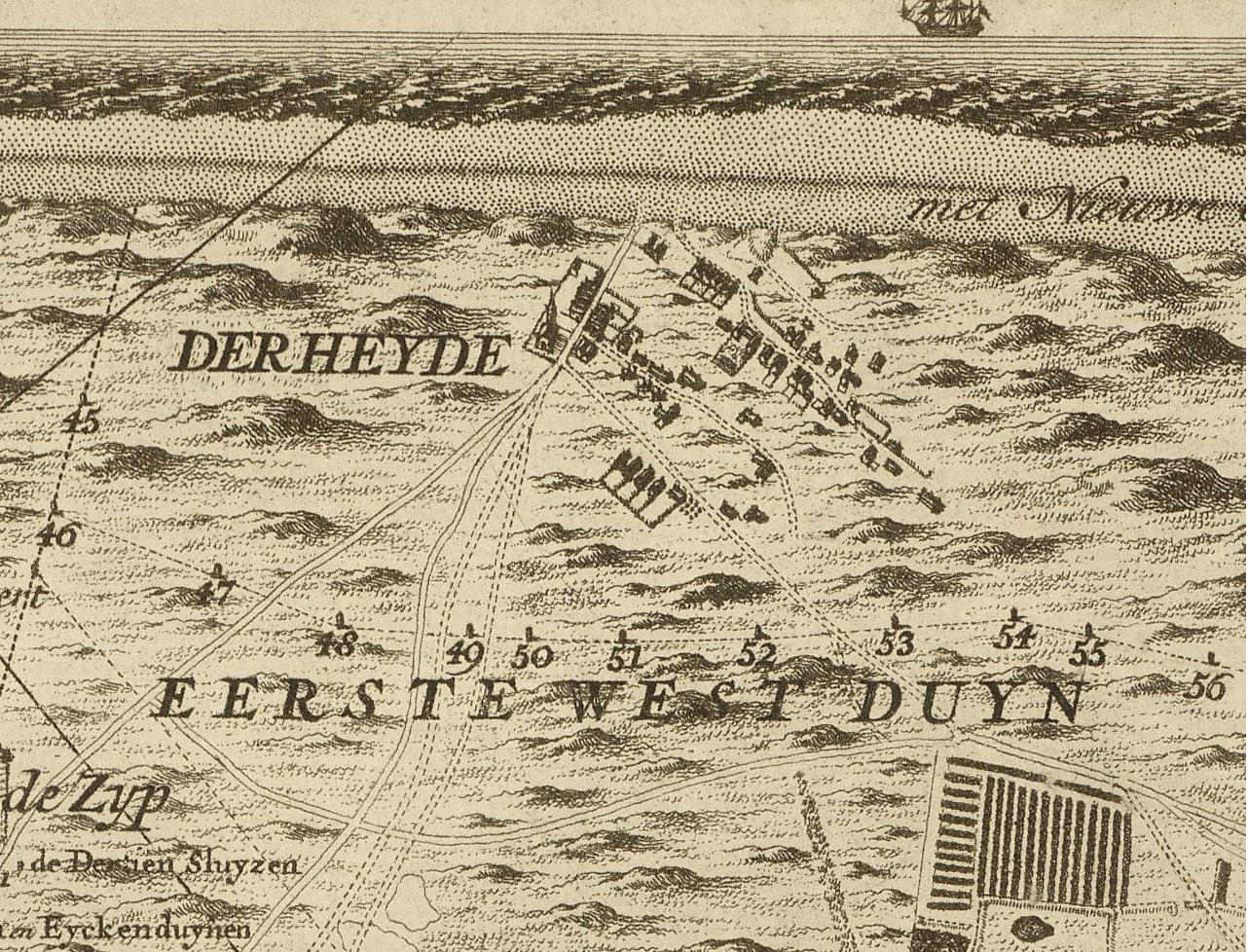 Kaart van het hoogheemraadschap van Delfland, gemeten door de landmeters Nicolaas en Joacobus Kruchius. Afgebeeld is Ter Heijde, Zuid-Holland.